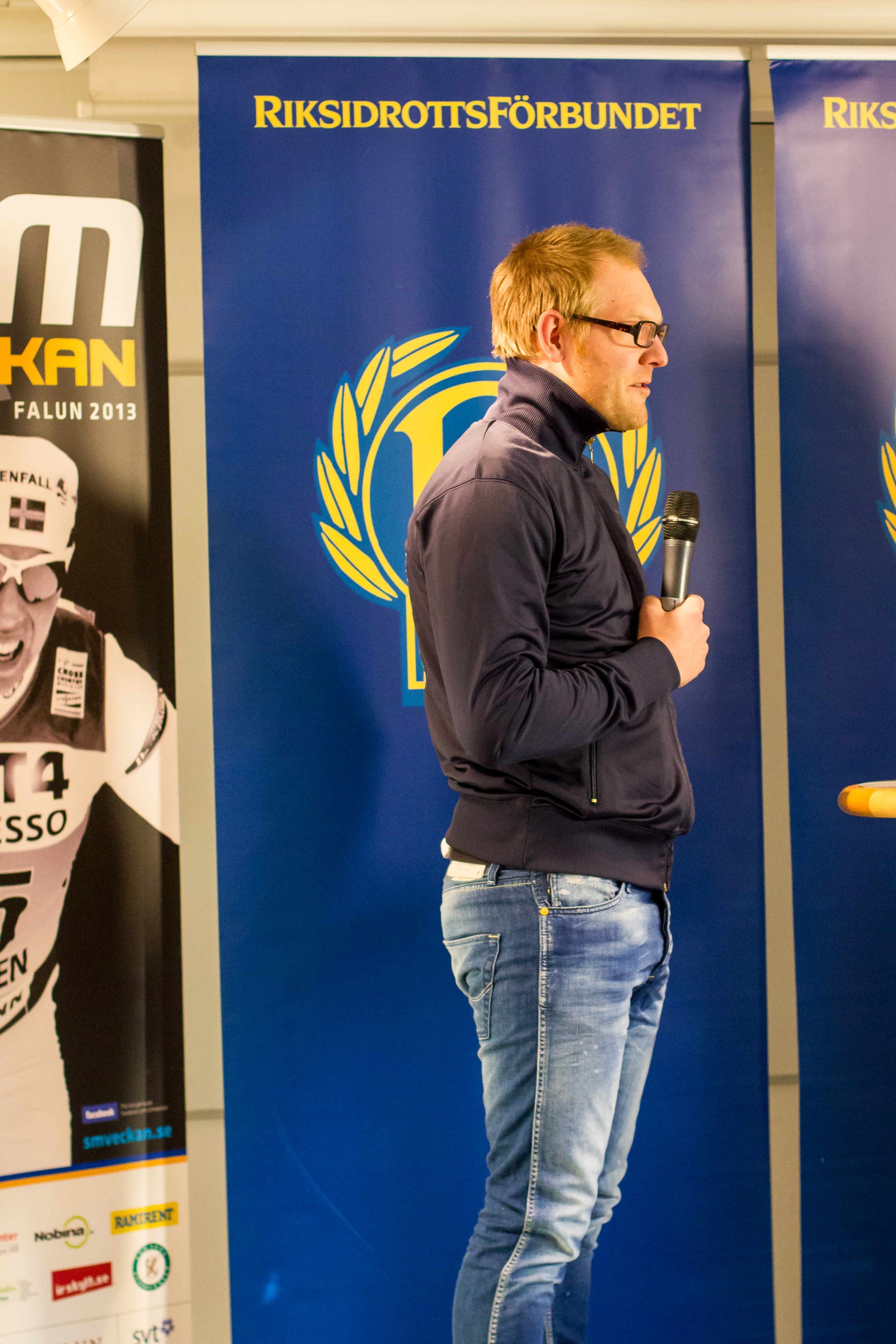 Cyklisten Johan Landström intervjuad av Gunilla Wikström på SM-veckan 2013:s presskonferens.